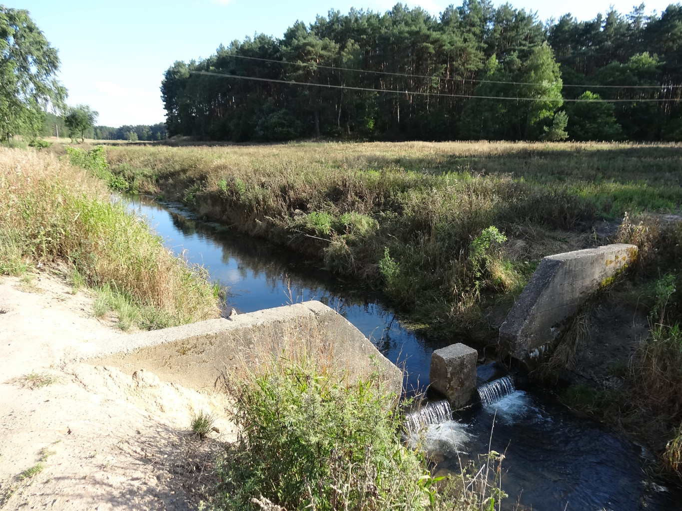 Struga Młyńska – dopływ Kanału Bydgoskiego w dolinie Podprądy na styku gminy Białe Błota i osiedla Miedzyń w Bydgoszczy